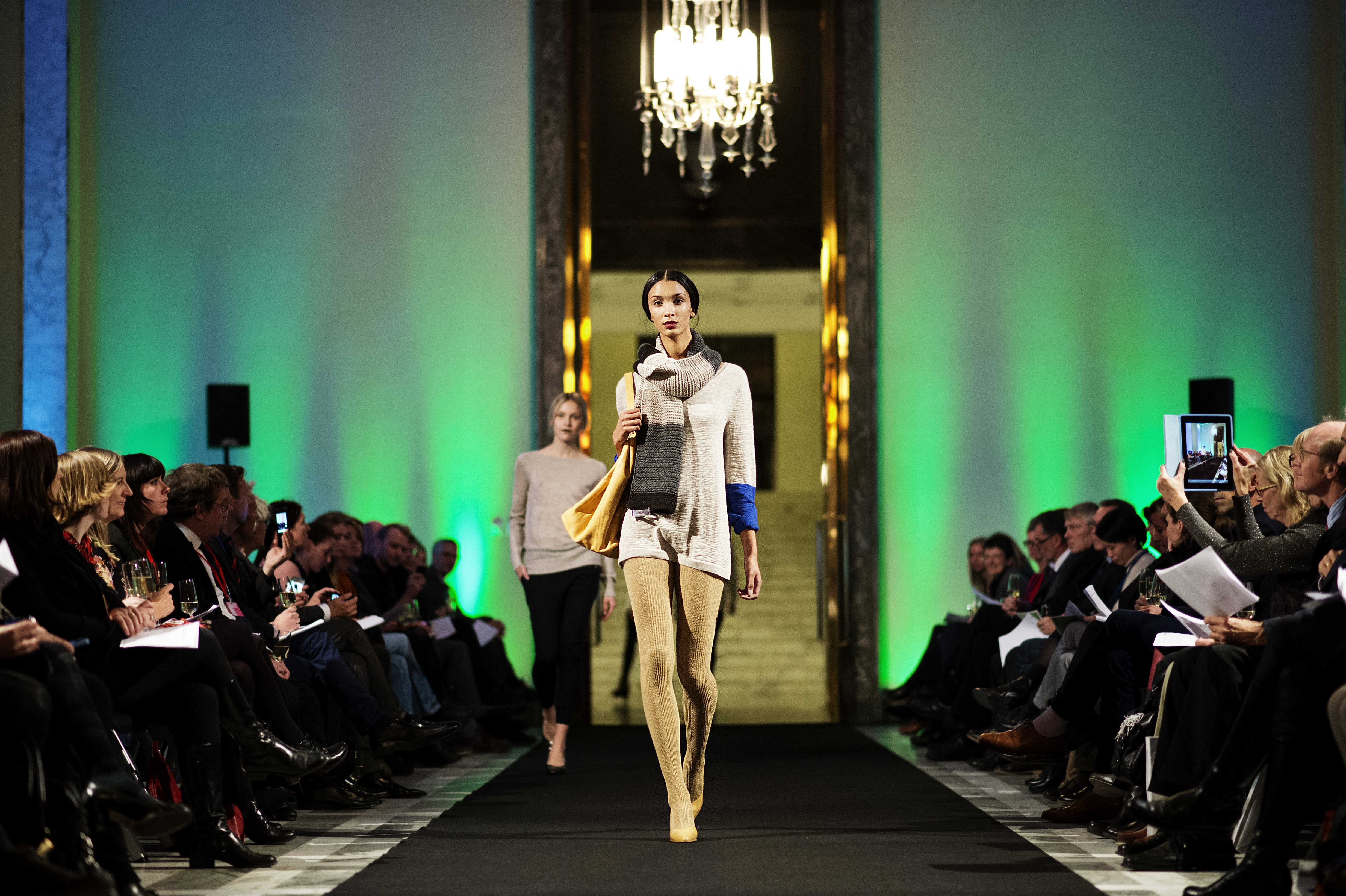 Nytt nordiskt mode och modevisning